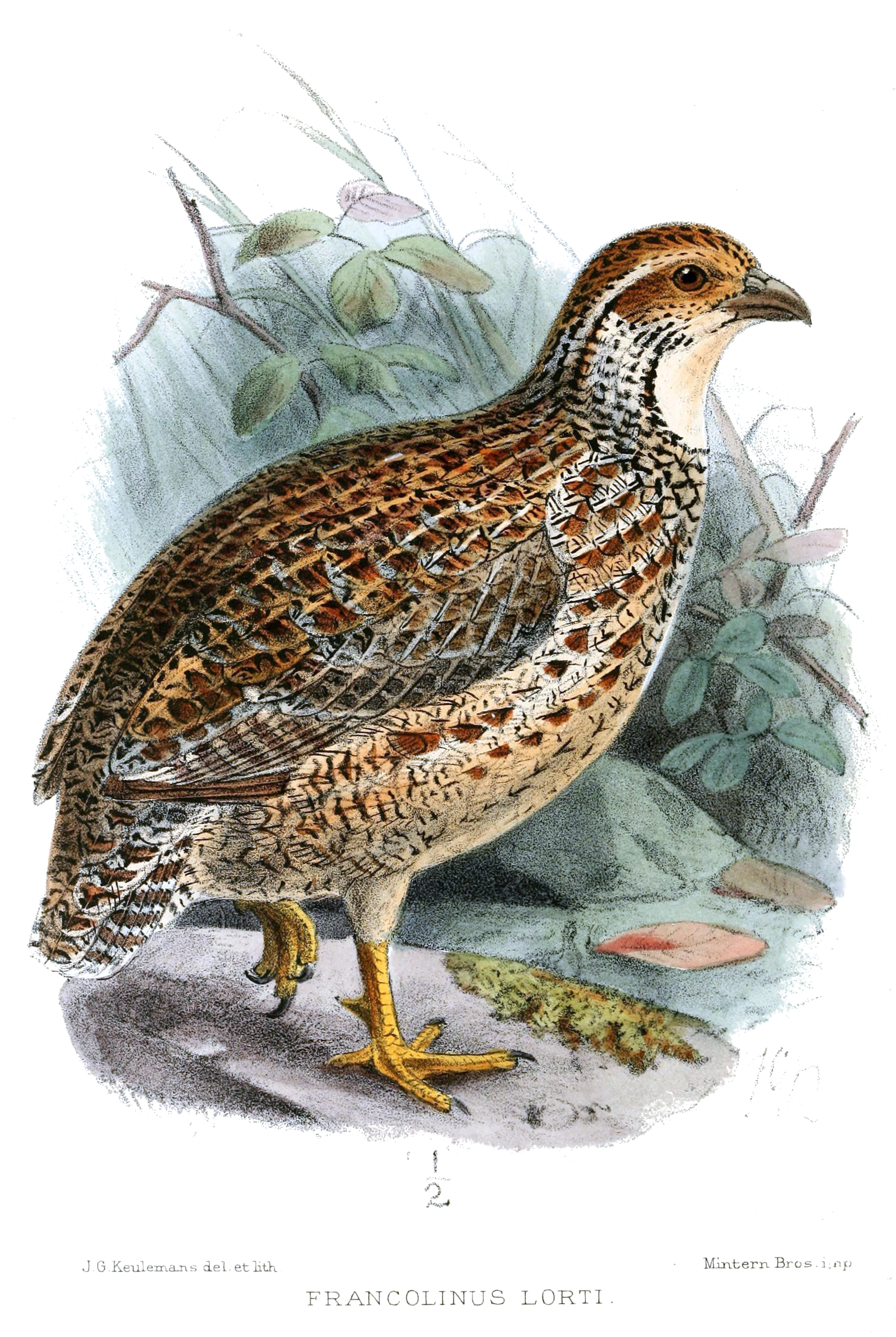 Francolinus levaillantoides lorti